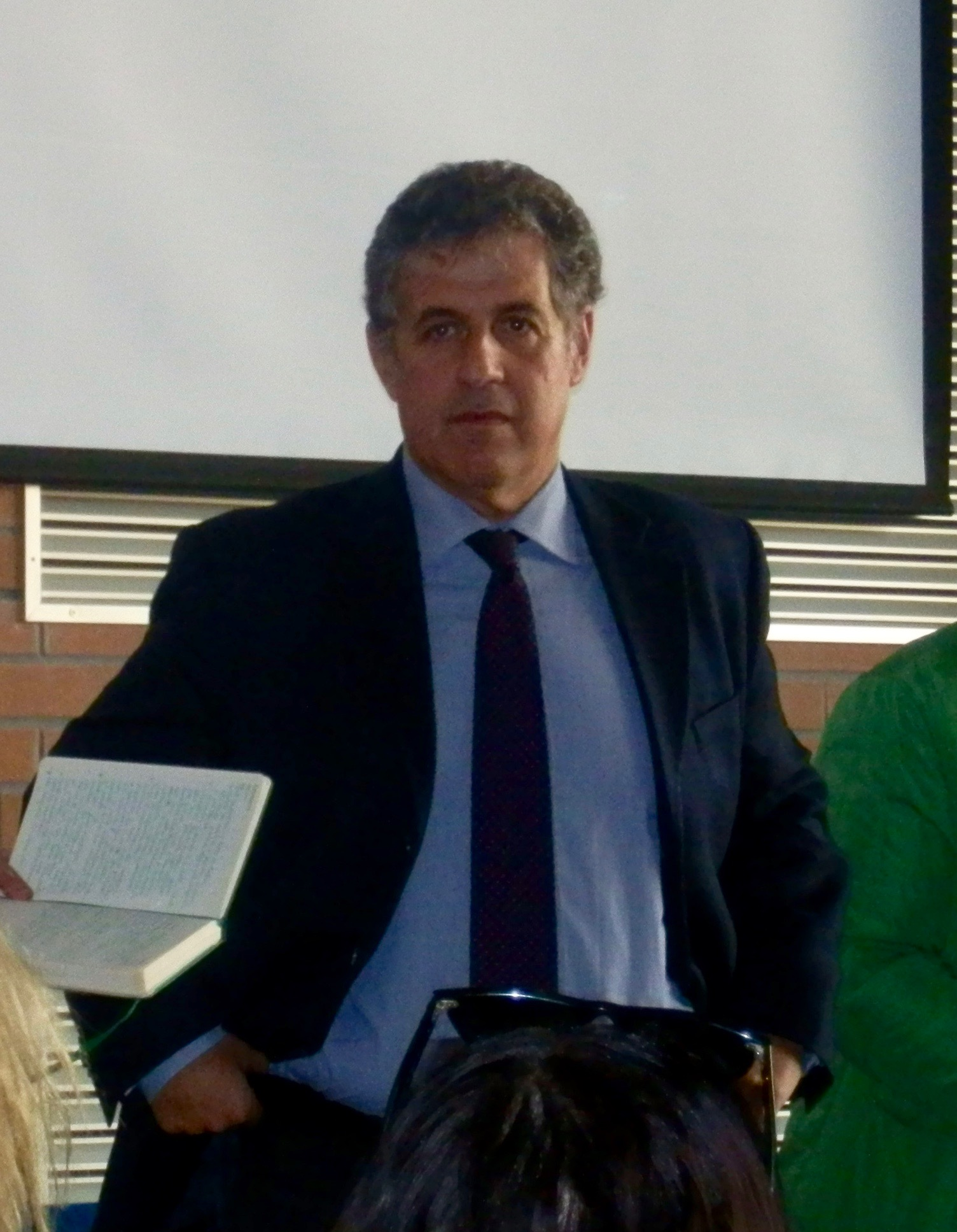 Nino Di Matteo nel liceo Copernico di Bologna nel novembre 2015